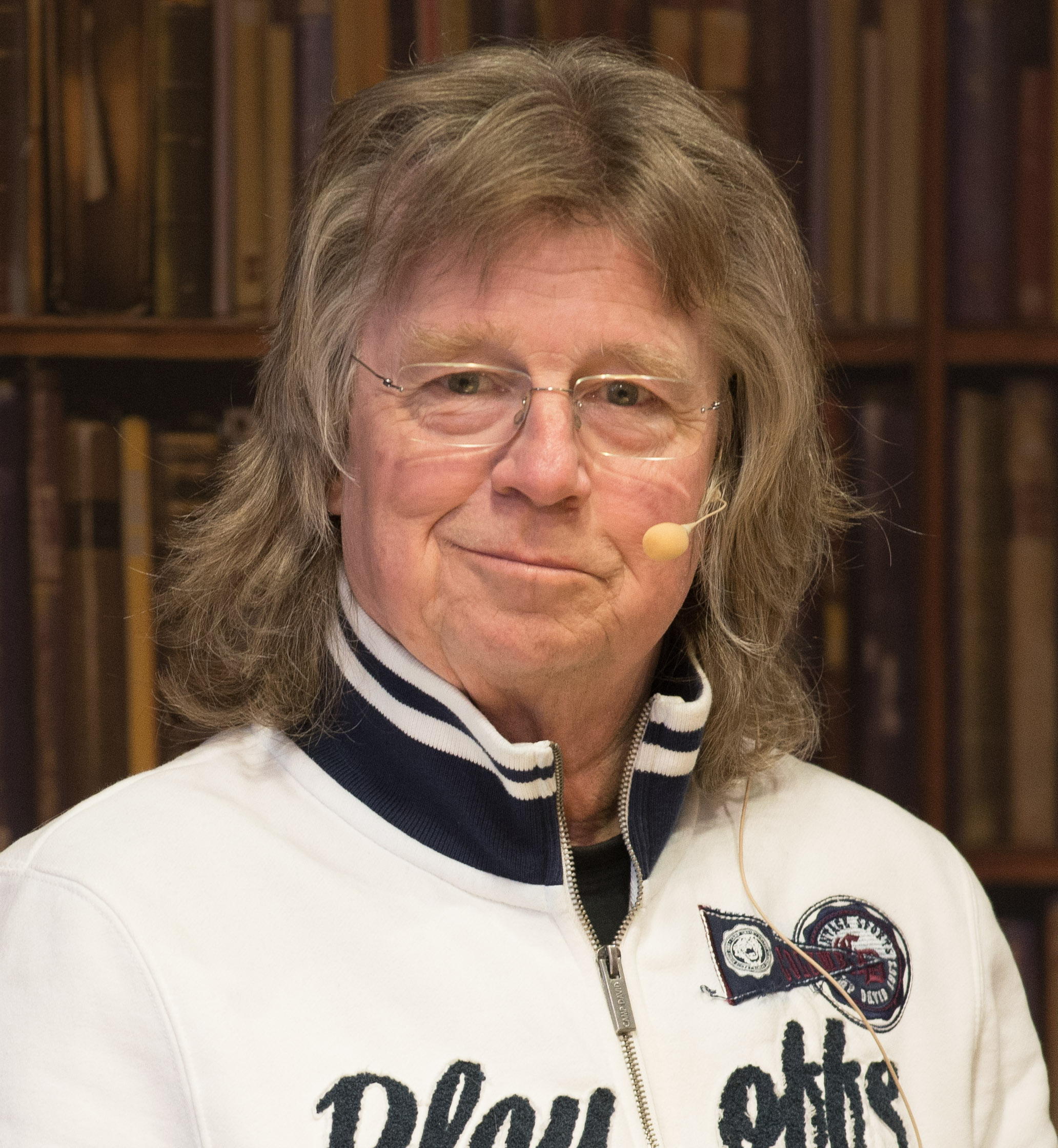 Janne Schaffer berättar om nya boken Zingalongtajm med Electric Banana Band på Akademibokhandeln på Mäster Samuelsgatan i Stockholm den 2 maj 2015.